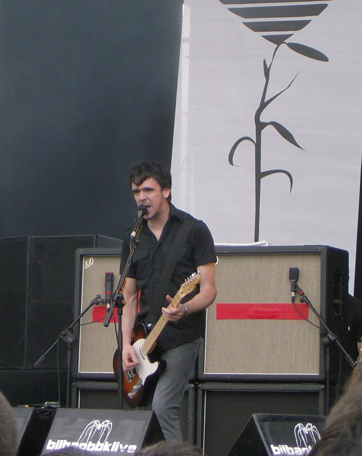 Gorka Urbizu (Berri Txarrak) en Bilbao BBK Live 2007